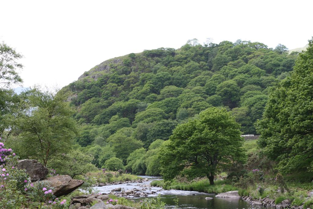 Dinas Emrys, Gwynedd 05/06/2006 Rhion Pritchard : own work